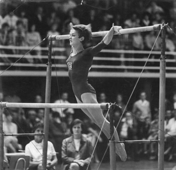 Zentralbild-Koch-Sche-He-9.10.1968-Berlin: DDR-Teilnehmer der XIX. Olympischen Sommerspiele 1968 in Mexiko. Turnen: Karin Janz (SC Dynamo Berlin).